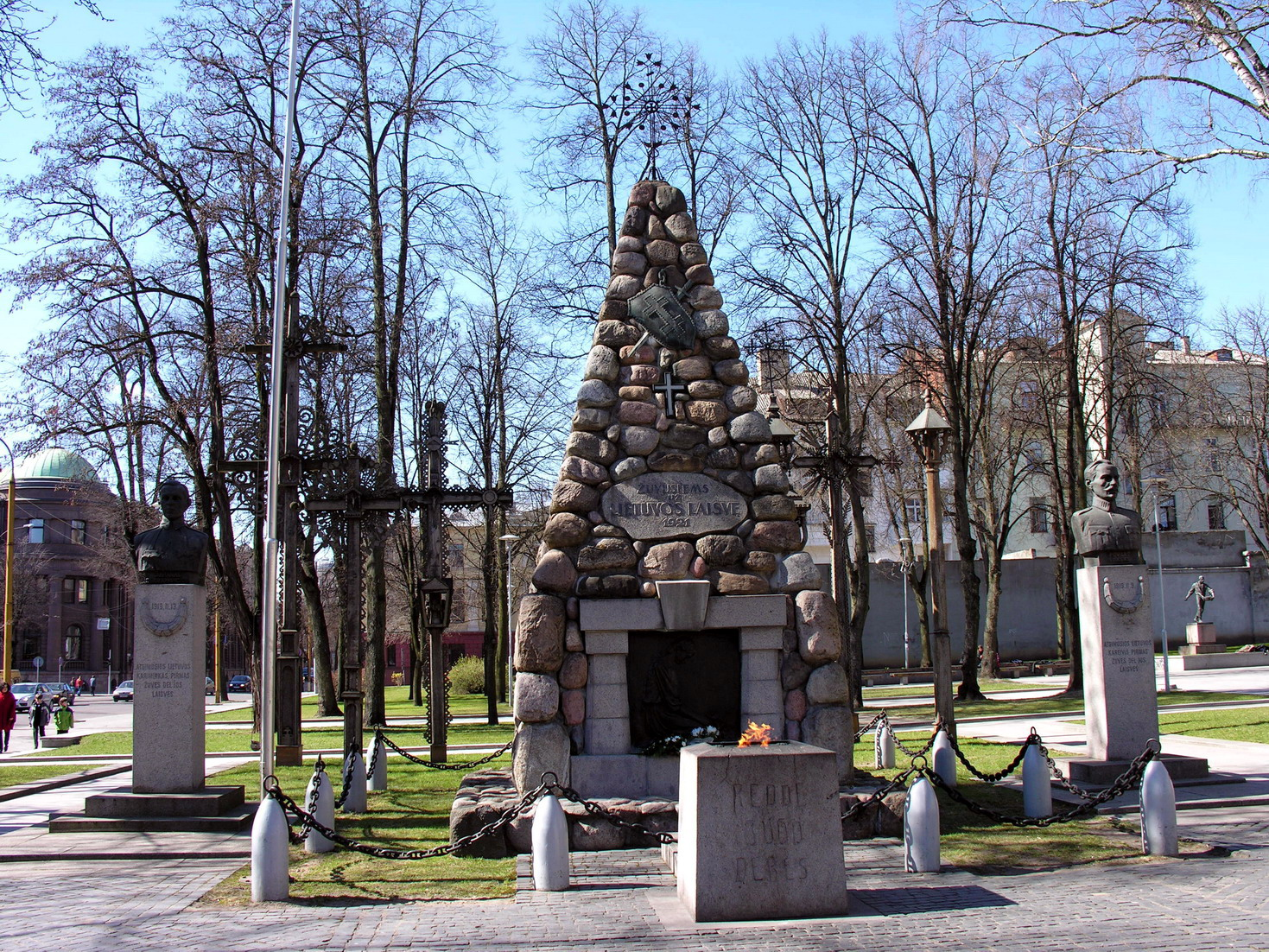 Karo muziejus, Kaunas. 1921 m. spalio 16 d. sodelyje atidengtas paminklas Žuvusiems už Lietuvos laisvę.